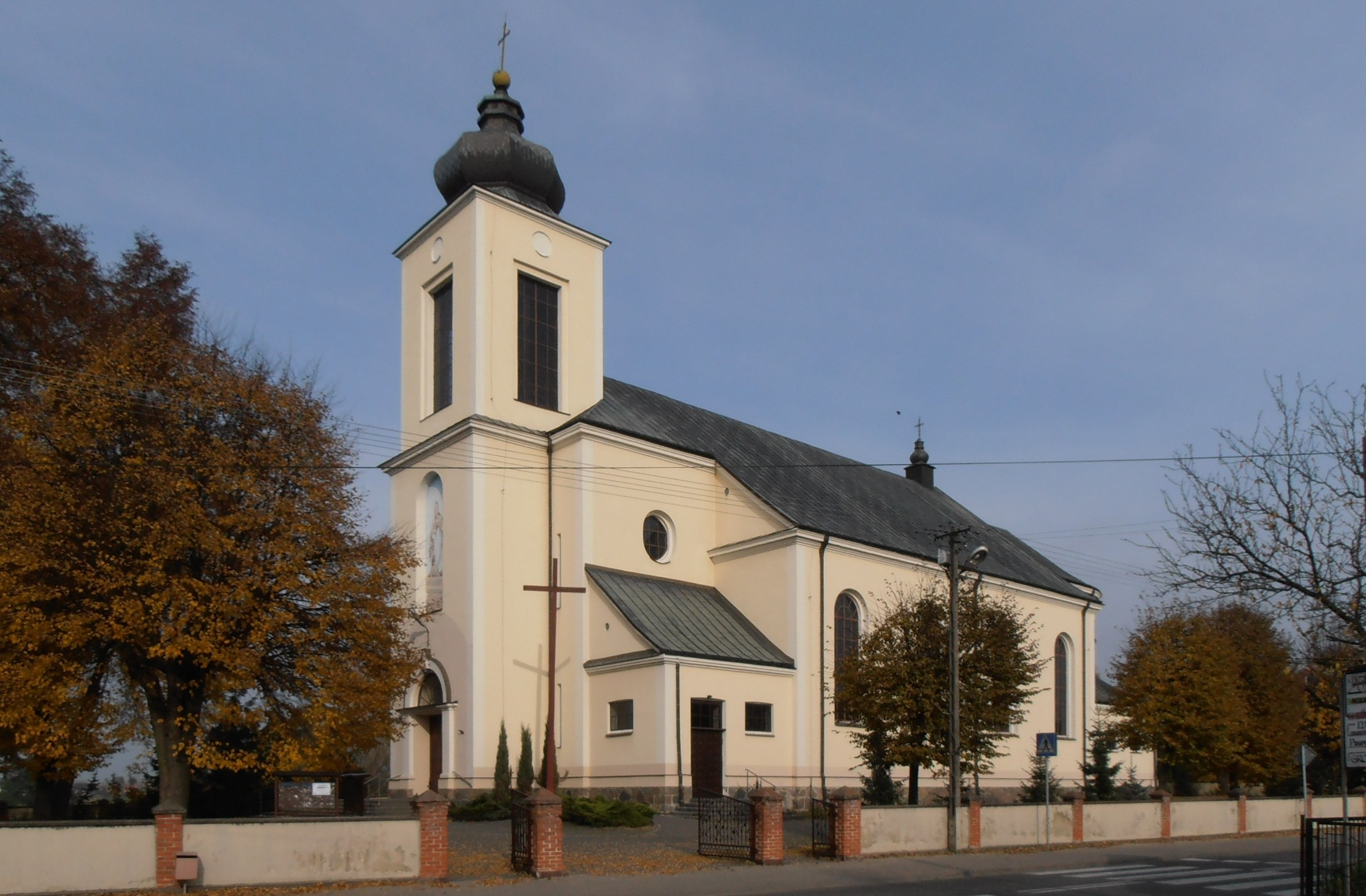 Serokomla (pow. łukowski, woj. lubelskie, Polska). Rzymskokatolicki kościół pw. św. Stanisława.